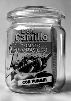 Objekt (Kunst)